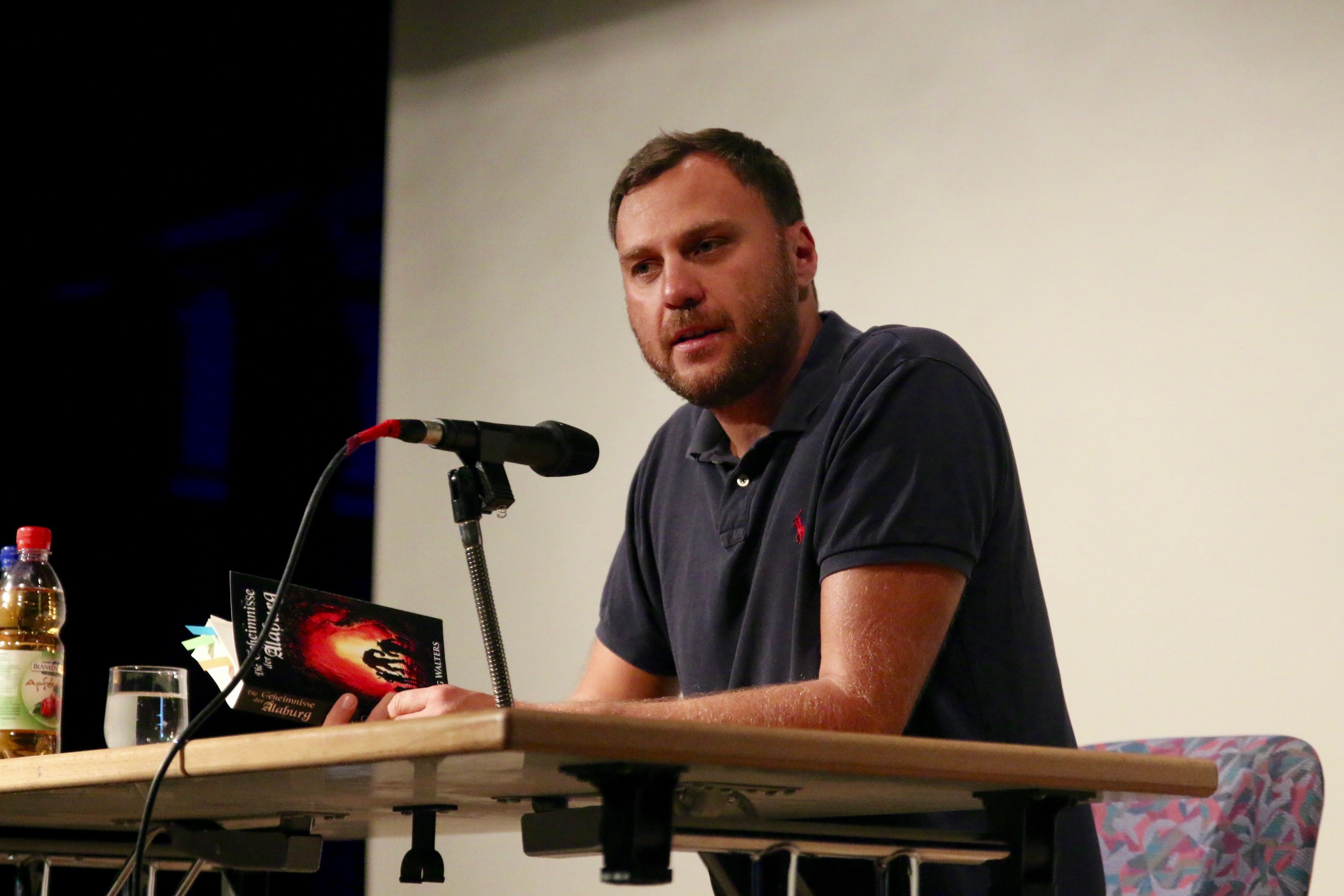 Greg Walters bei einer Lesung in Garbsen bei Hannover